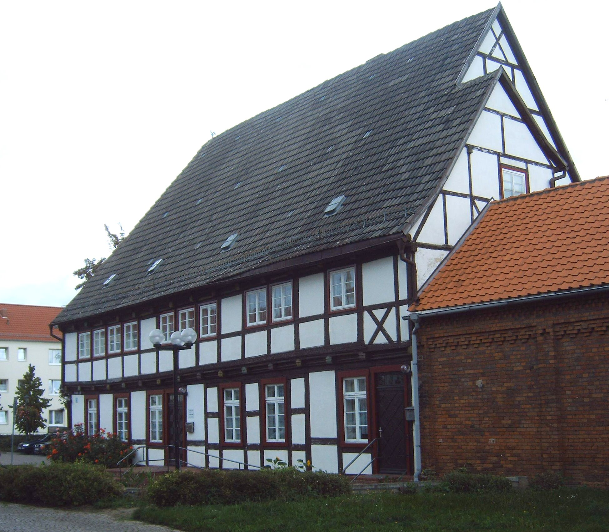 Pfarrhaus der Sankt-Nikolai-Kirche in Oschersleben, Sachsen-Anhalt, Deutschland